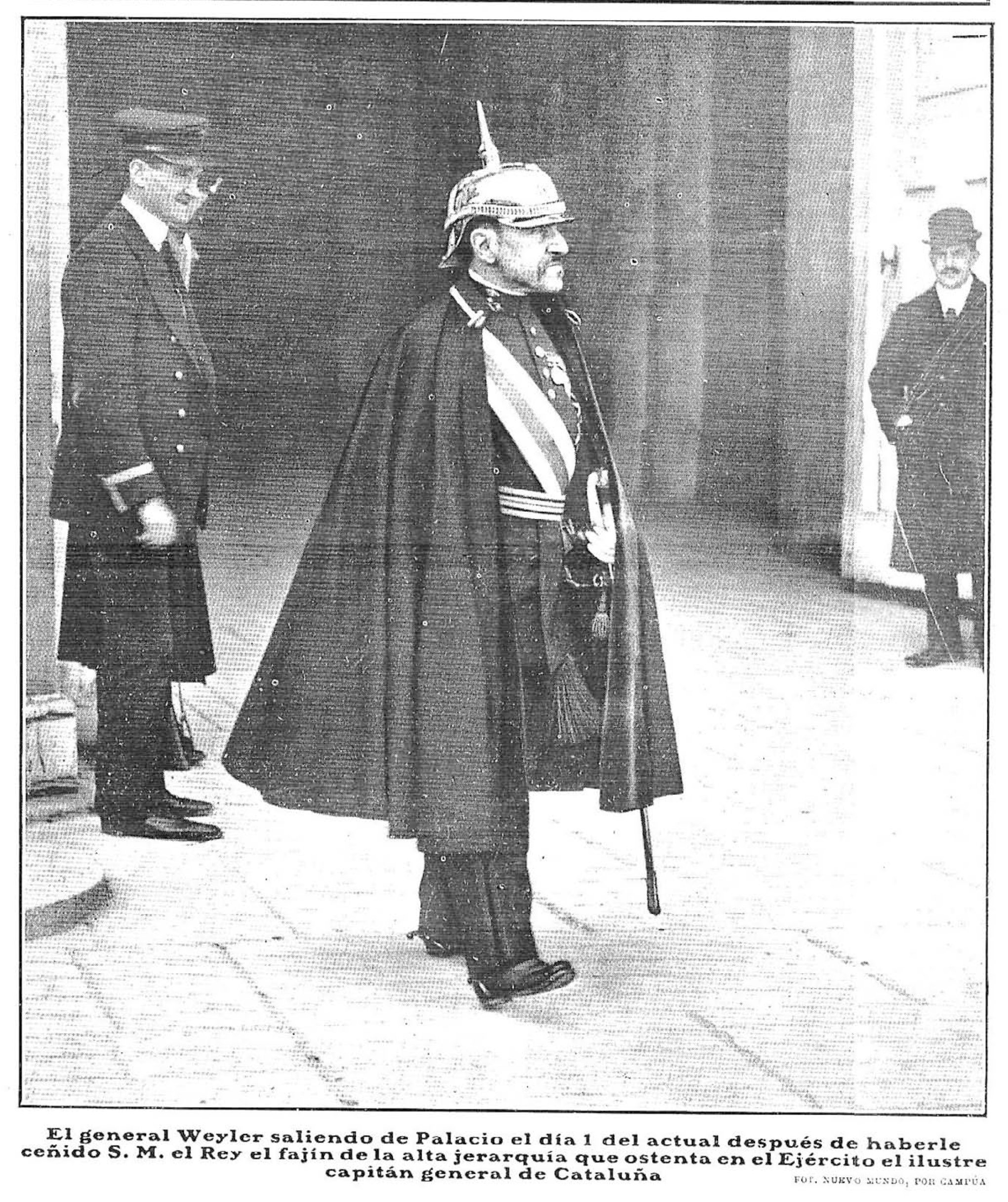 Valeriano Weyler.